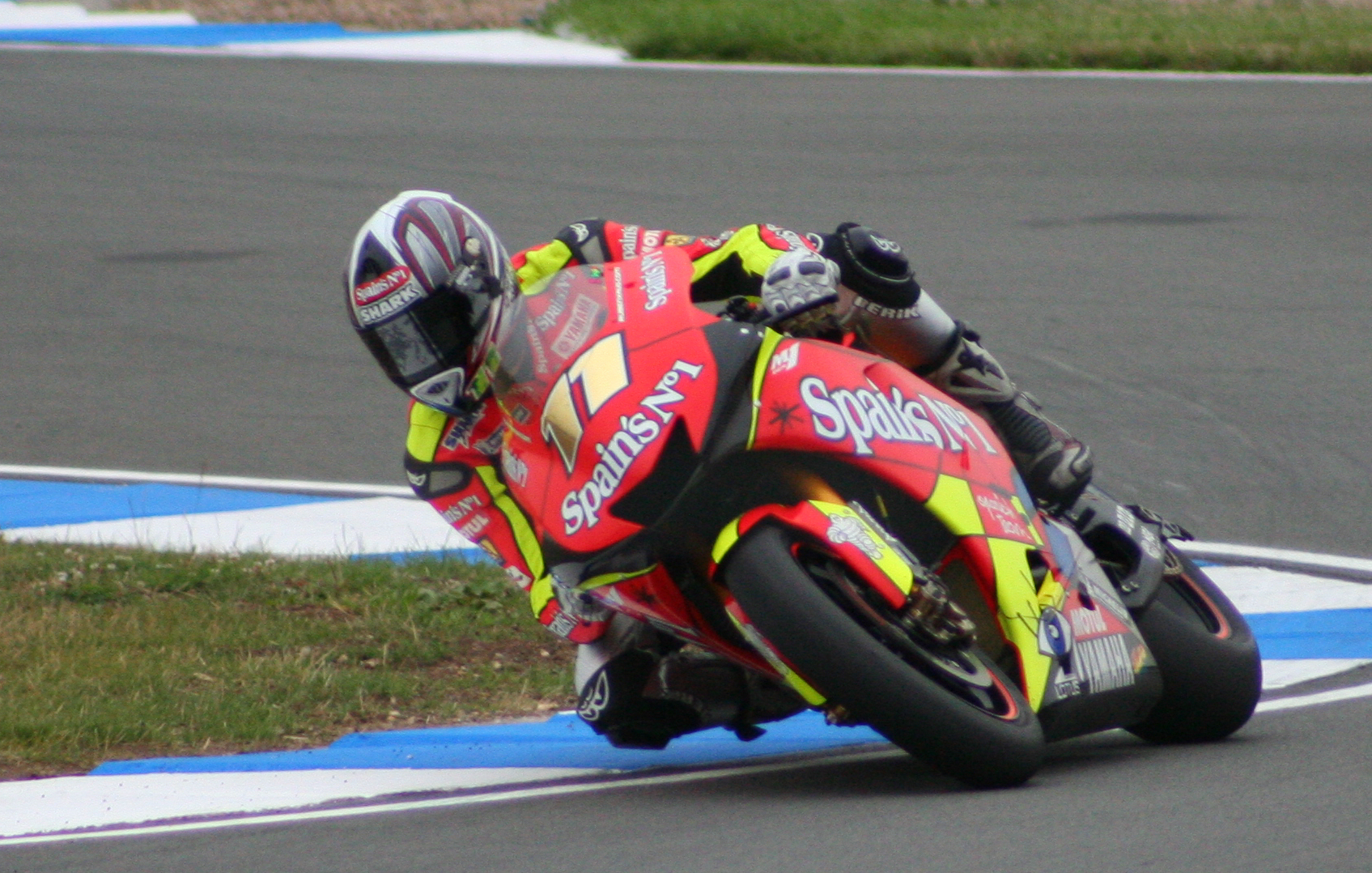 Ruben Xaus, Donington, 2005